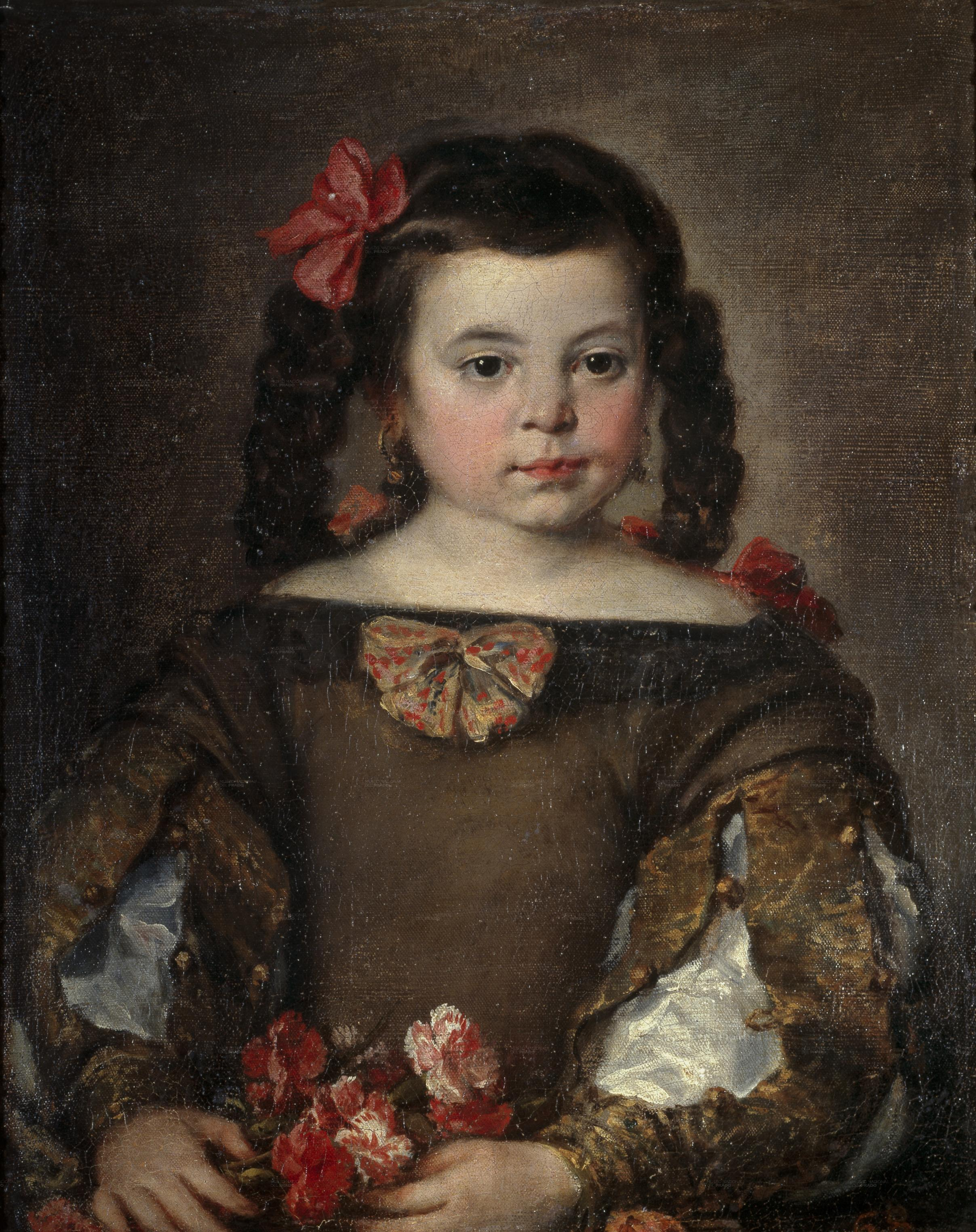 Una niña. Junto con su pareja, retrato de niña, quizá su hermana, se creyó en el siglo XIX obra de Velázquez.